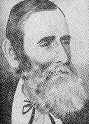 Foto del expresidente salvadoreño Tomás Medina que gobernó la república de El Salvador de manera interina como senador designado del 1 al 3 de febrero de 1848.